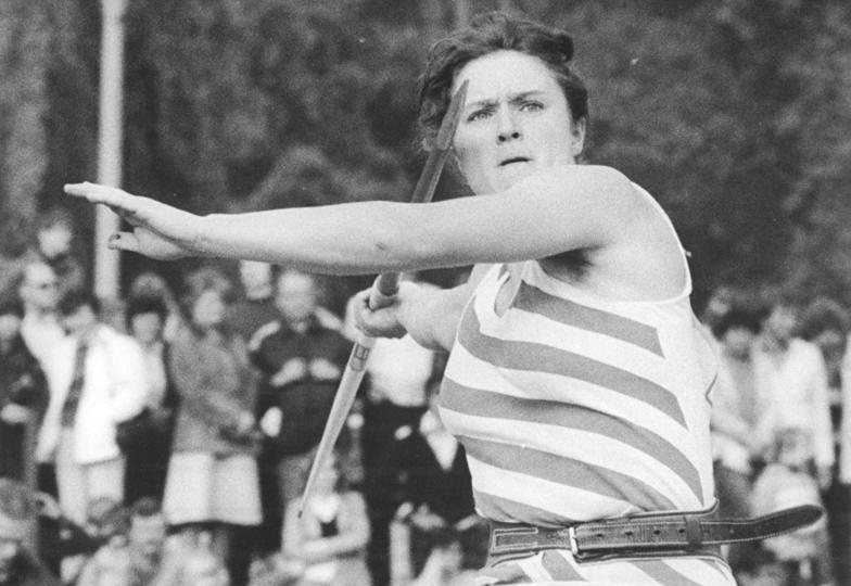 Antje Kempe ADN-ZB Kasper 28.5.83-BL-Bez. Gera: Leichtathletik Mit 69,80 m wurde Antje Kempe vom SC Motor Jena DDR-Speerwurfrekordlerin auf dem Leichtathletiksportfest in Jena. Abgebildete Personen: Kempe, Antje: Leichtathletin, DDR